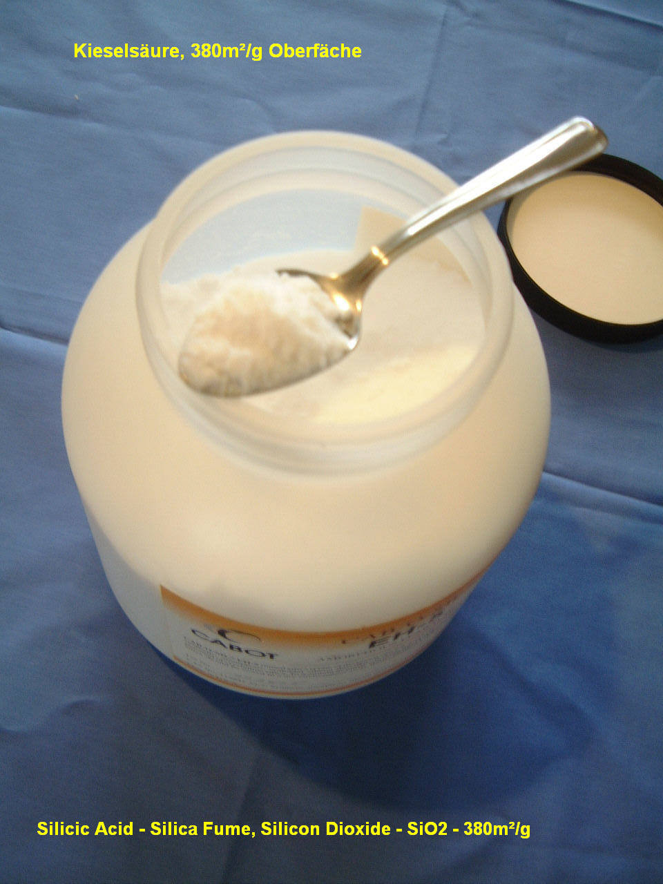 Kieselsäure oder Siliziumdioxyd 380m²/g Silicic Acid, or Silica Fume or Silicon Dioxide, 380m²/g